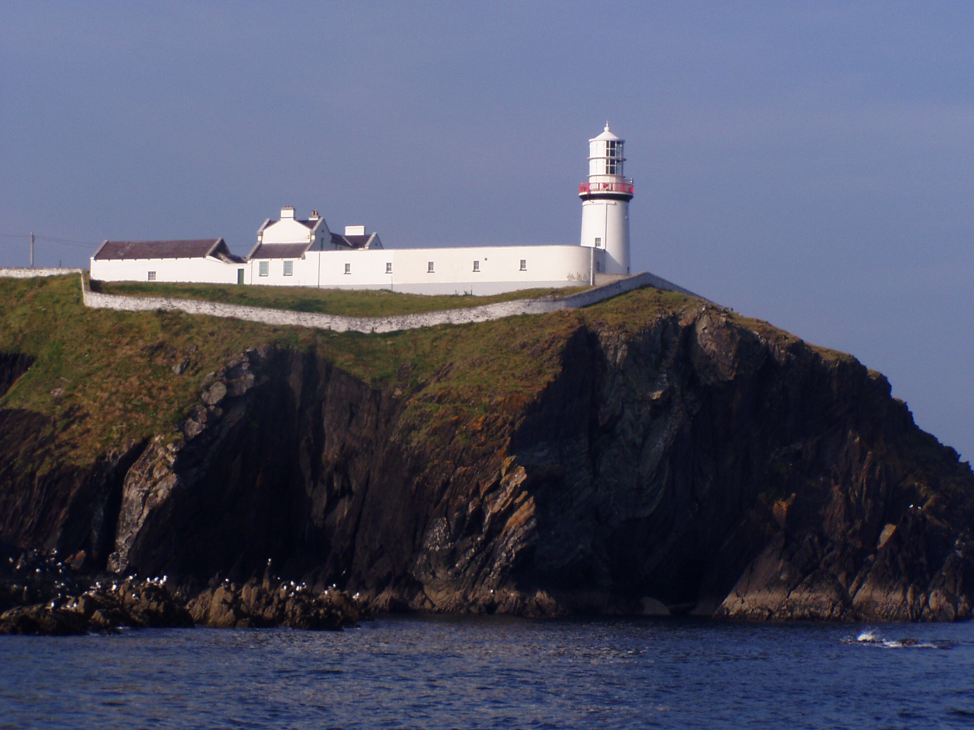 Maják na skalisku nad oceánem v Irsku v oblasti Clonakilty nedaleko Corku.